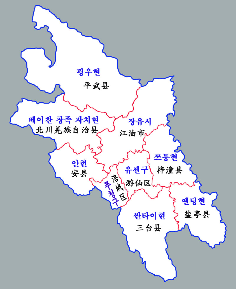 쓰촨성 몐양시 현급행정구역도